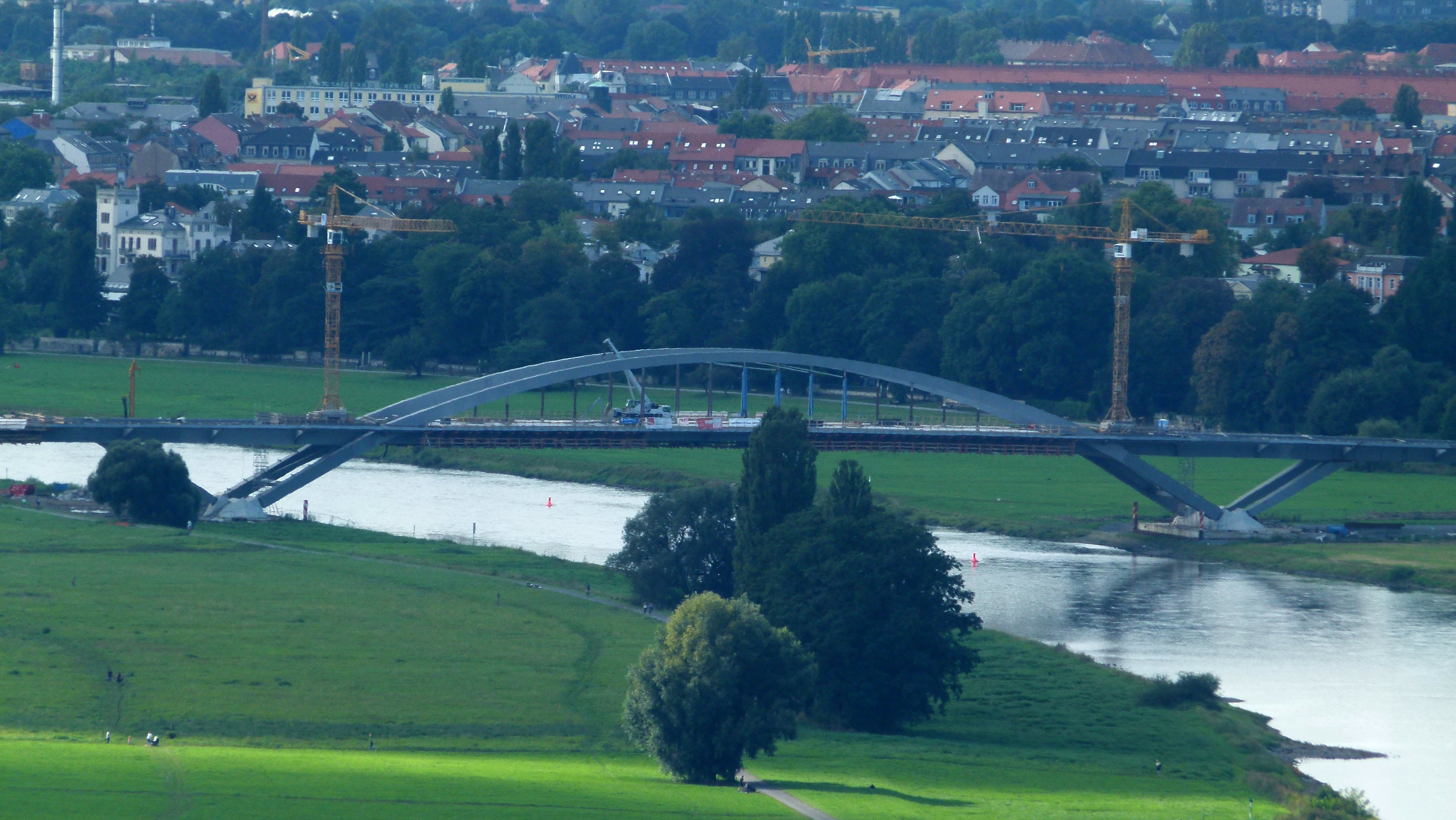 Der Bau der Waldschlößchenbrücke in Dresden im September 2011